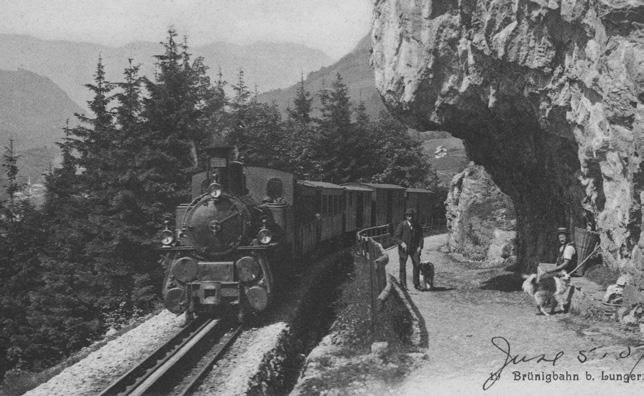 Eine HG 3/3 zieht einen mit Güterwagen ausgelasteten Personenzug dem Käppeli entgegen.